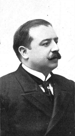 D. Trinitario Ruiz Valarino, Gracia y Justicia, obra del fotógrafo Manuel Compañy, recogido en la revista española Actualidades (1908).